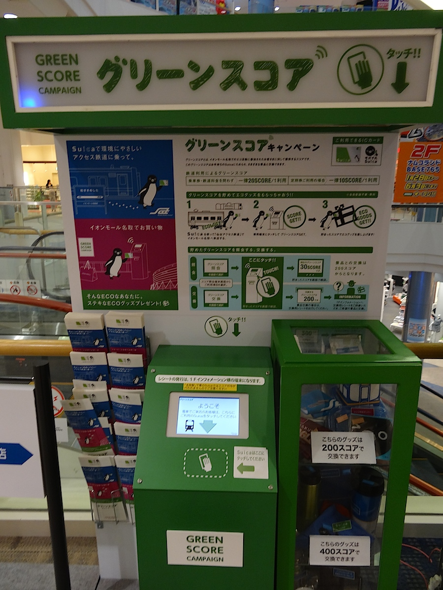 グリーンスコア専用端末